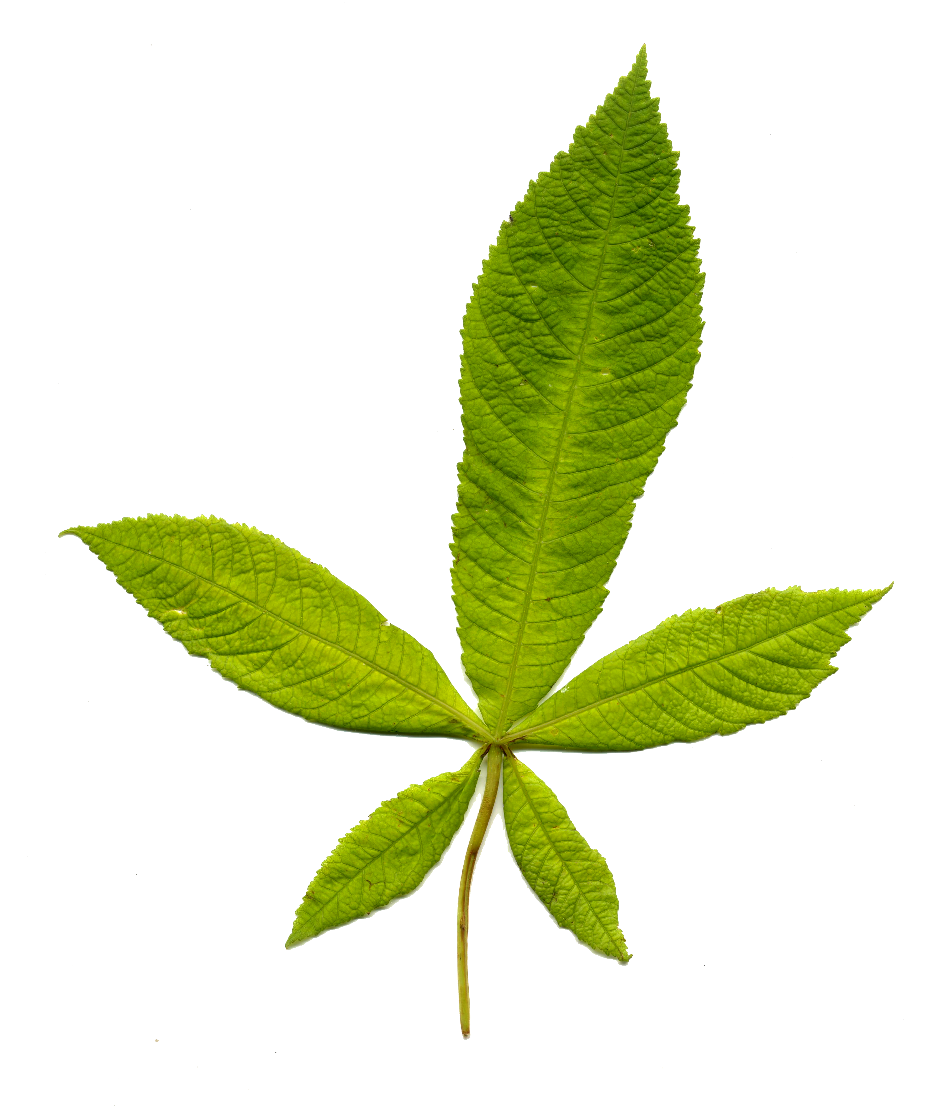 Junges Blatt der Rosskastanie